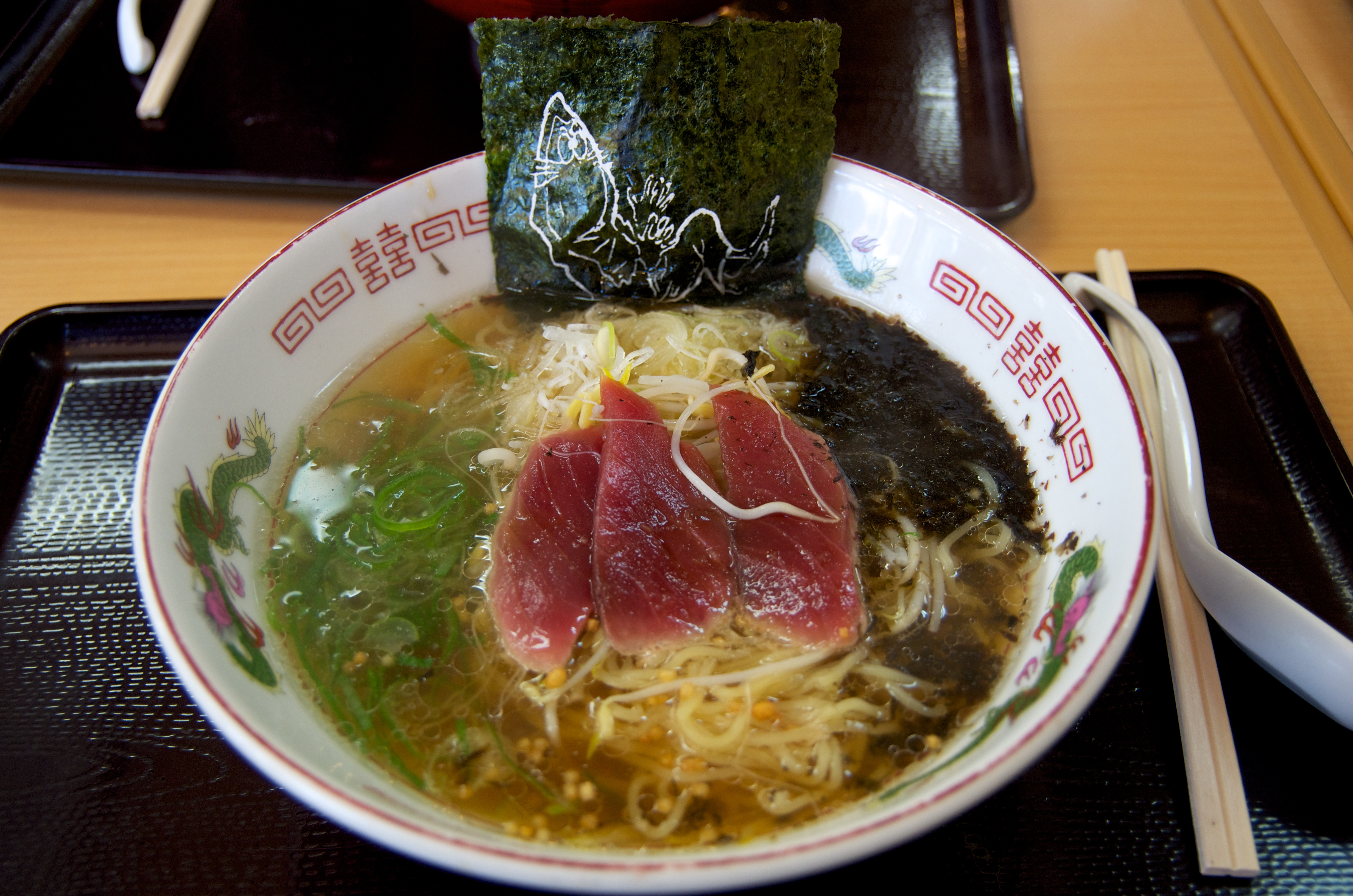 In Sakaiminato, Japan.